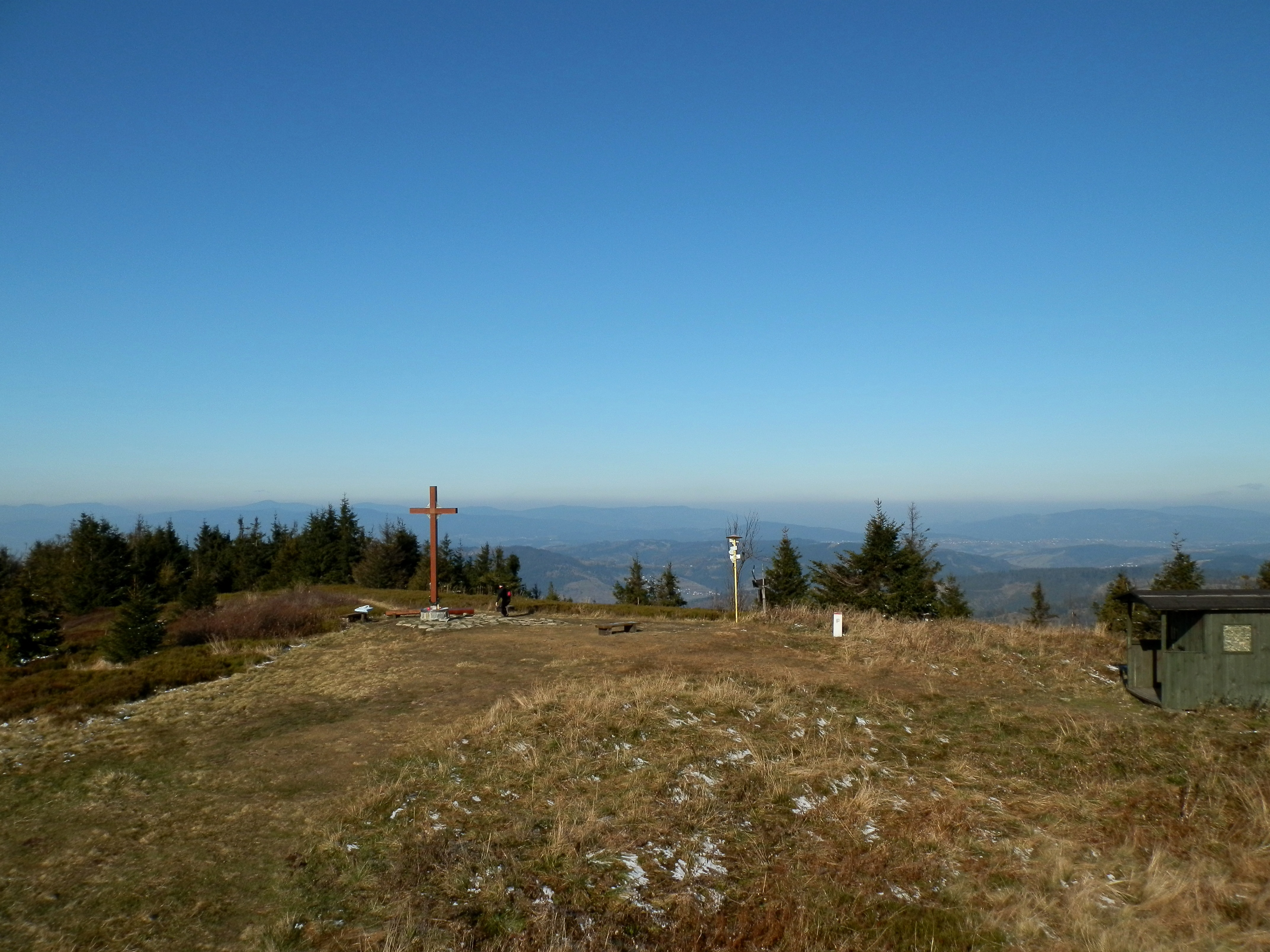 Vrchol Veľkej Rače -hranica, 1236 m.n.m